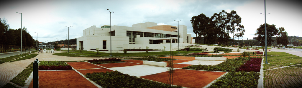 Centro Cultural Biblioteca Julio Mario Santo Domingo